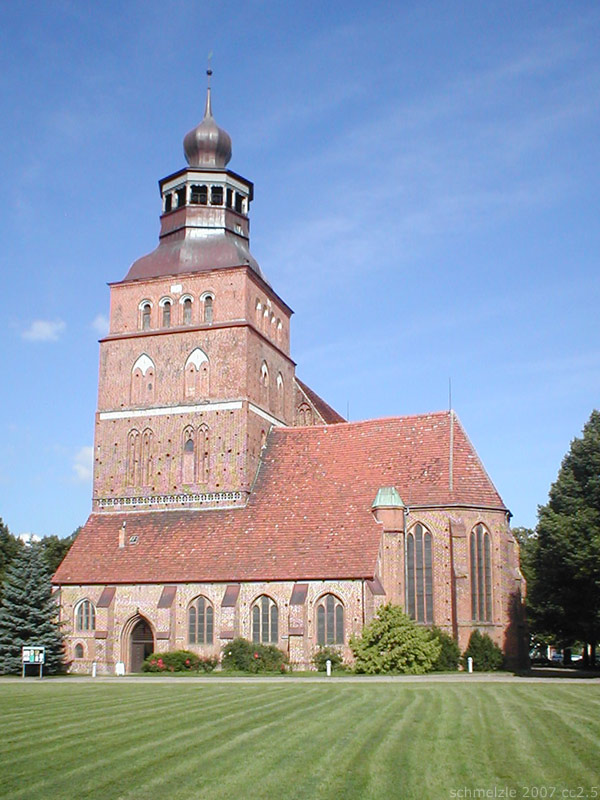 Stadtkirche St. Johannis in Malchin, Mecklenburg-Vorpommern, Deutschland